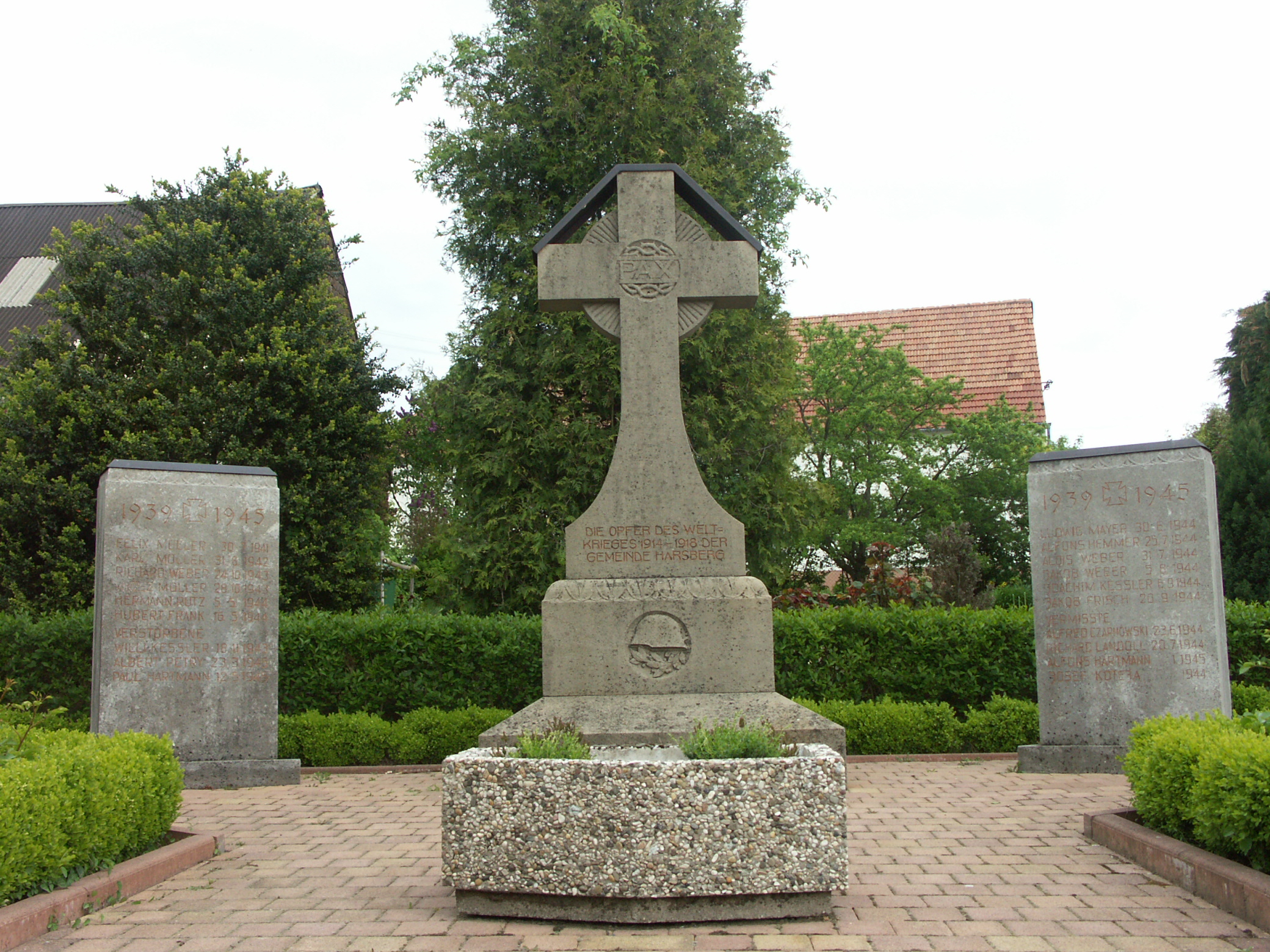 War Memorial - Krieger-/Kriegsopferdenkmal - Mémorial de guerre